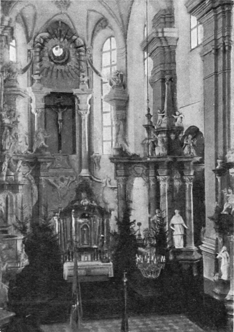 Беларуская (тарашкевіца): Валынцы (Vałyncy)